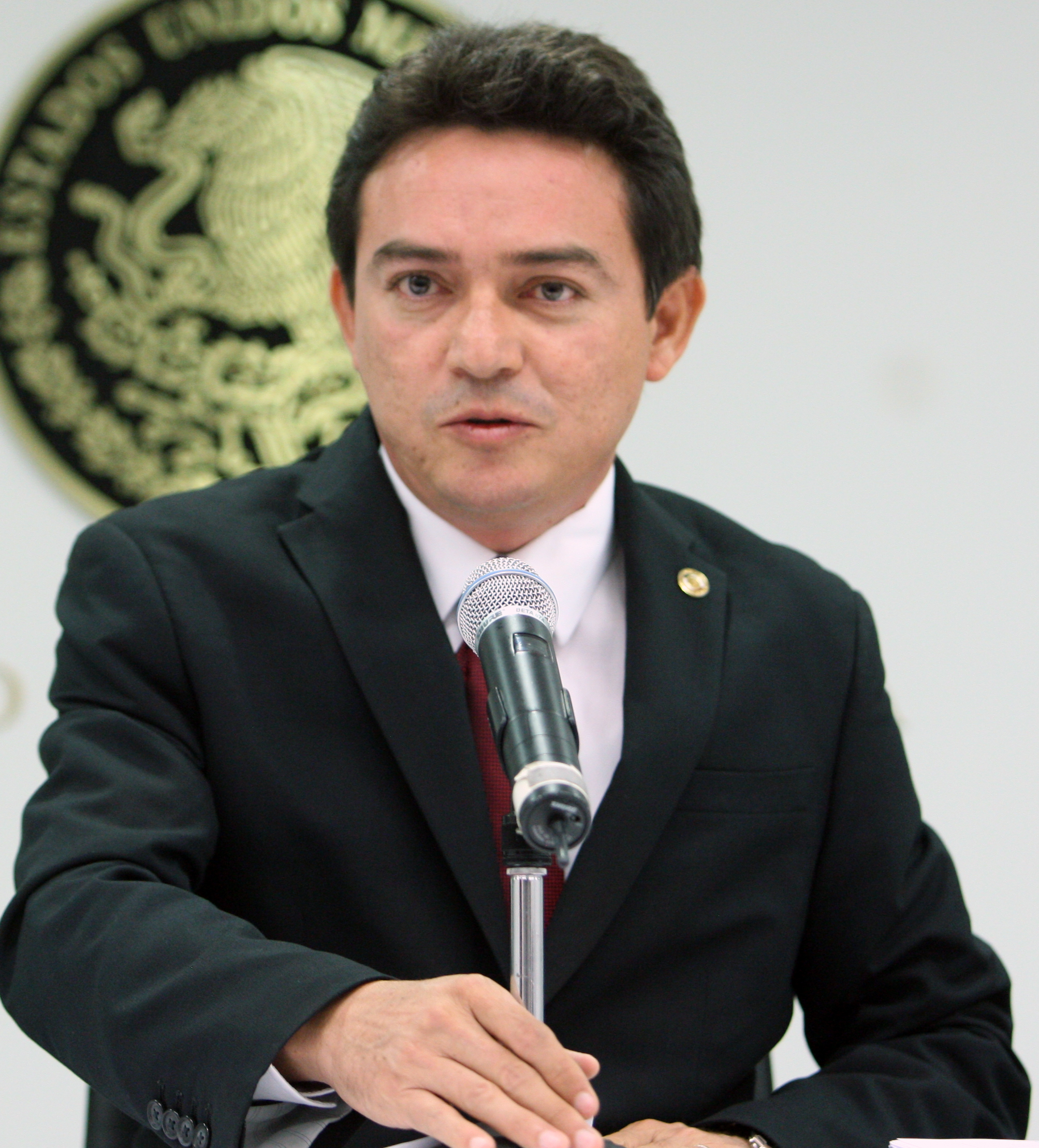 Conferencia de prensa